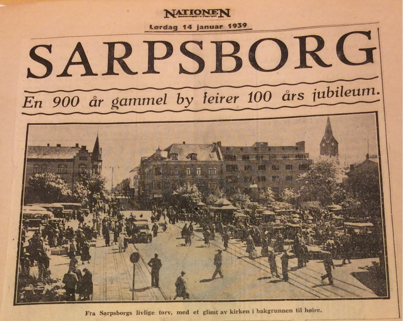 Nationens omtale av Sarpsborgs 100-årsjubileum i 1939